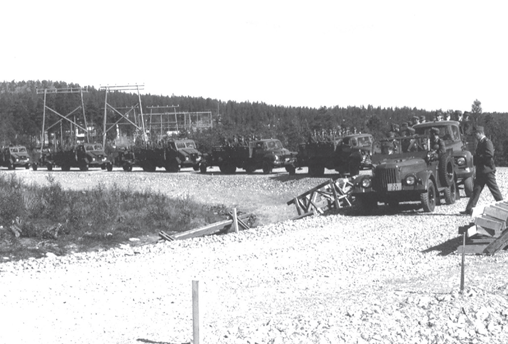 Siirto tapahtui maantiekuljetuksina.